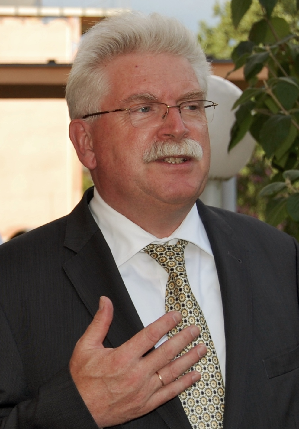 Martin Zeil (FDP), seit 2008 stellvertretender Ministerpräsident und Wirtschaftsminister im bayerischen Kabinett Seehofer